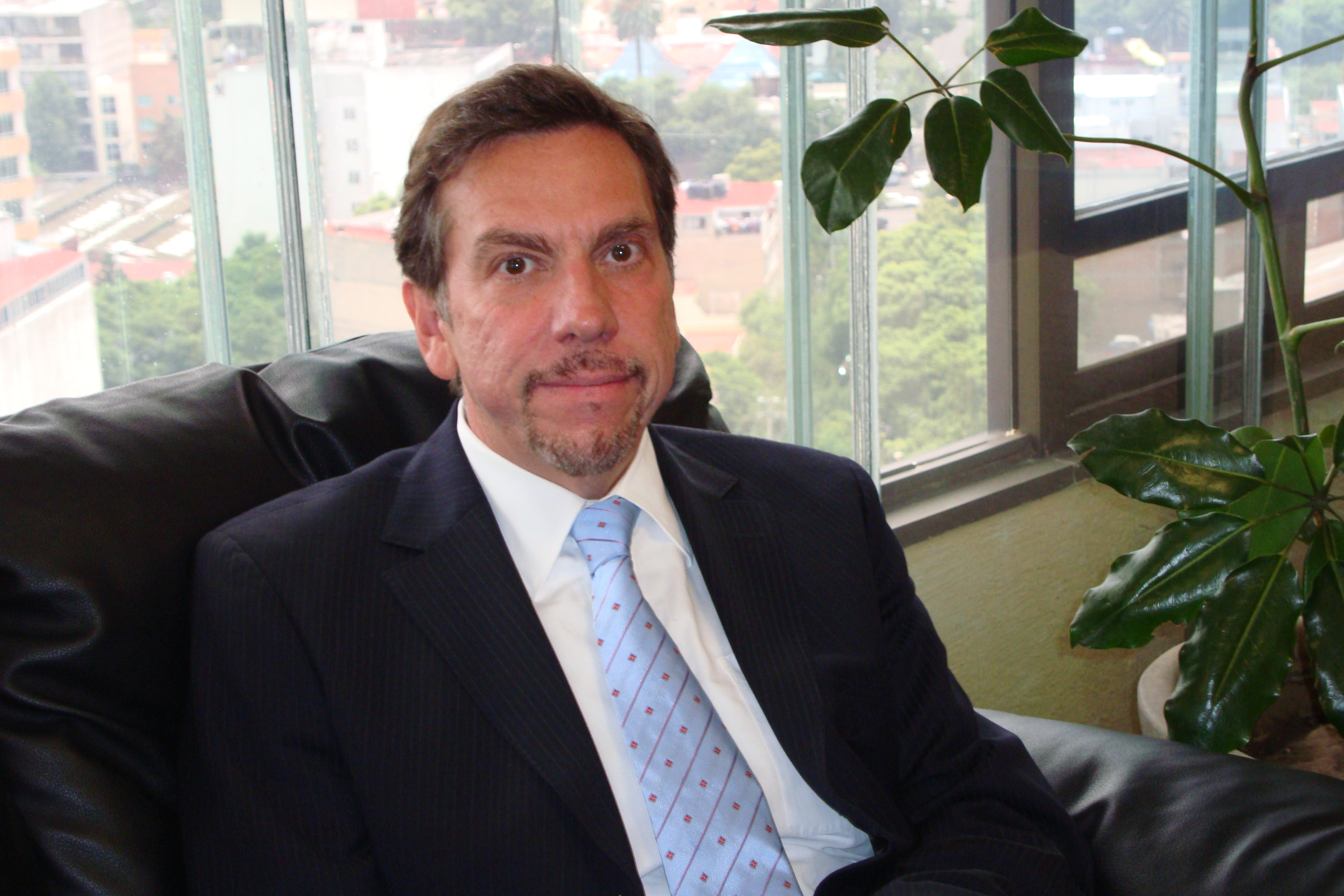 DR. JAVIER LAYNEZ POTISEK